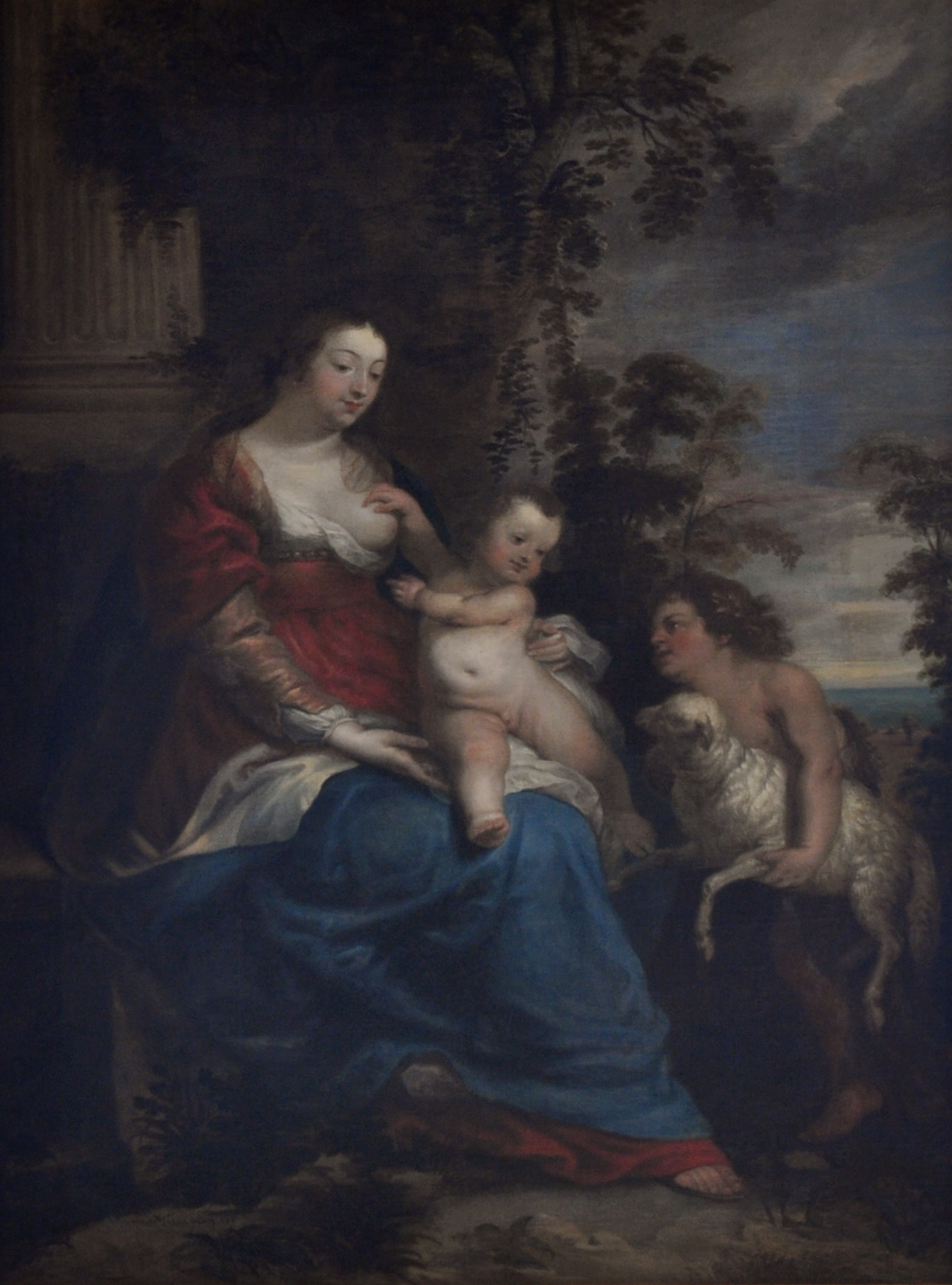 Tafelbild auf der Galerie